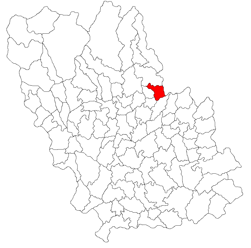 Categorie:Hărţi ale judeţului Prahova